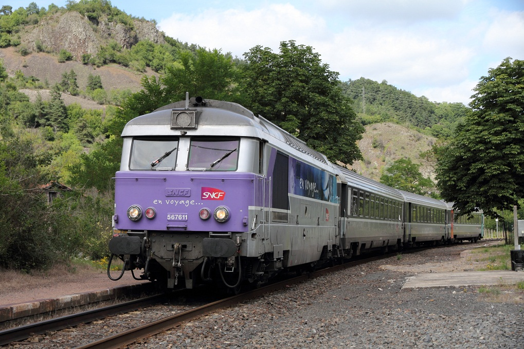 Passage sans arrêt du Cévenol à Alleyras en août 2011, Haute-Loire, France.